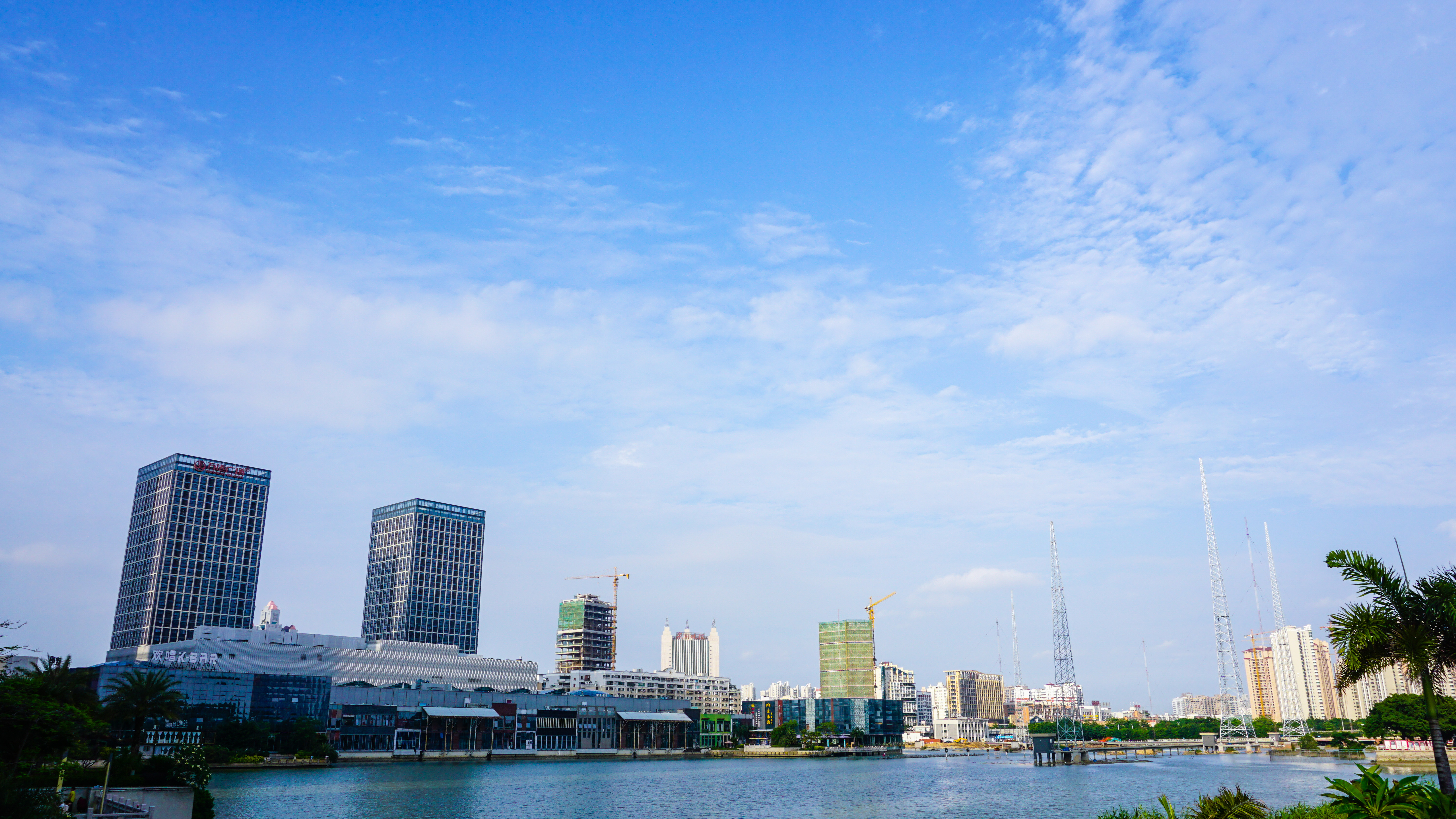 泉州浦西滞洪区与万达广场